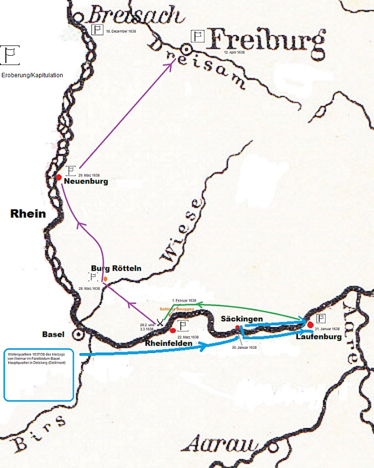 Die Bewegungen des Feldzuges von Herzog Bernhard von Weimar zu Beginn des Jahres 1638